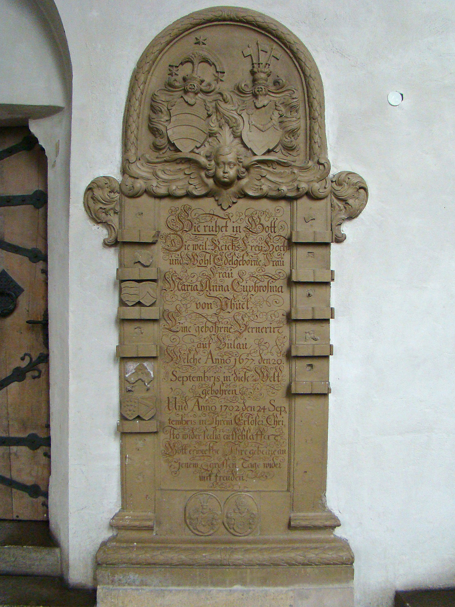 Historisches Grabmal in der Martinskirche in Kirchheim unter Teck